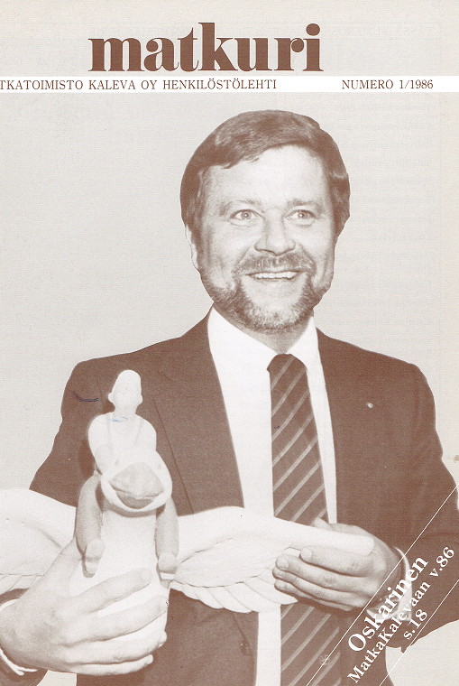 Henkilökuntalehti